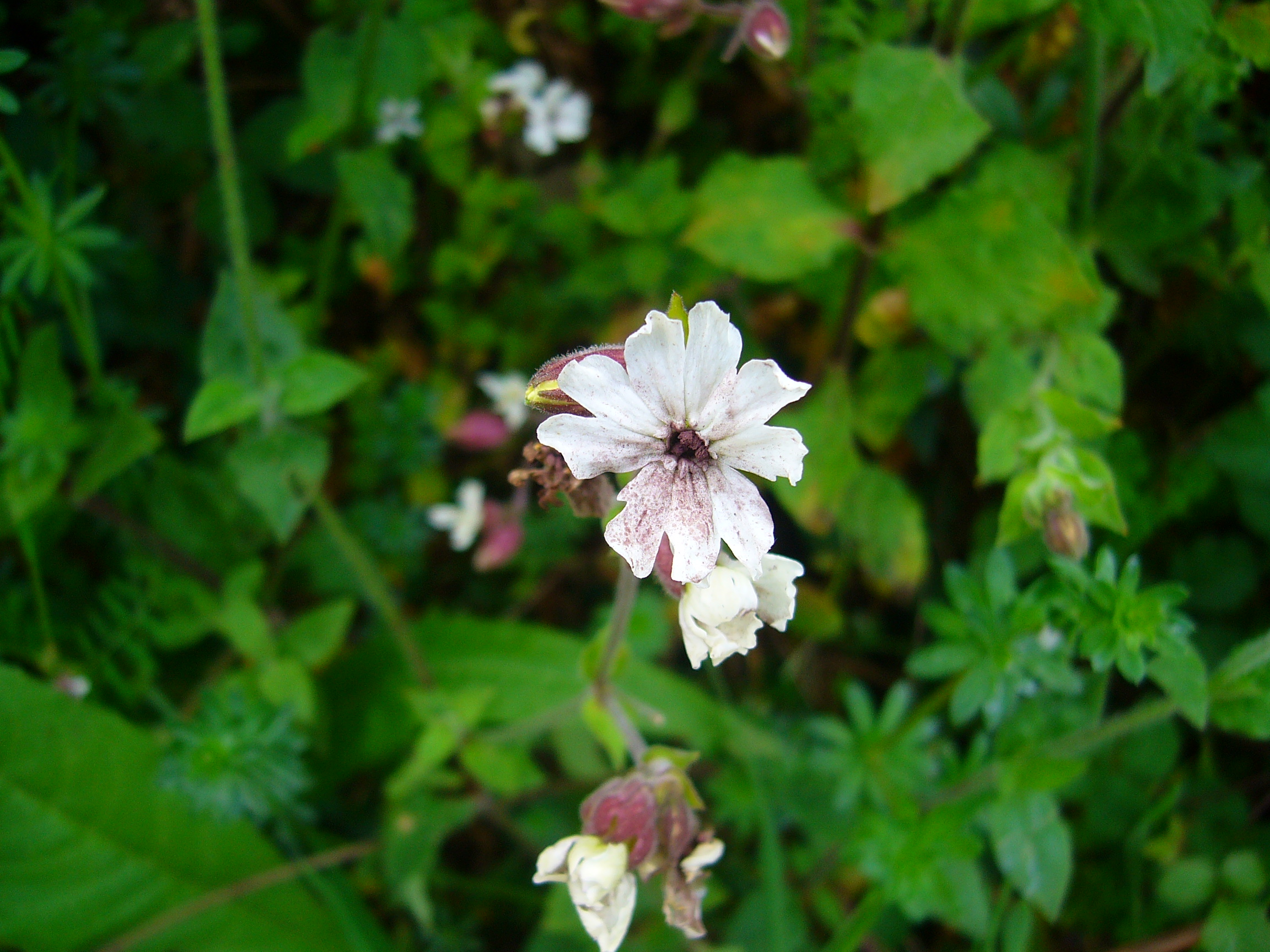 Microbotryum violaceum (Ustilago violacea) in Silene alba in Mount Zapateira, Corunna, Galicia, España.